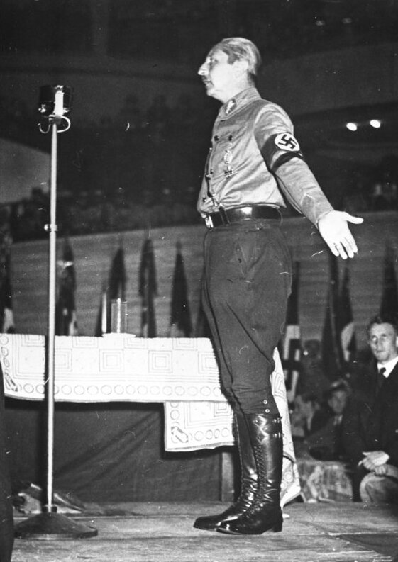 Prinz August Wilhelm im Sportpalast